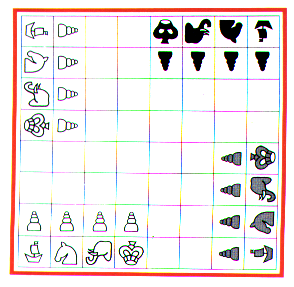 Um dos primeiros jogos de xadrez.